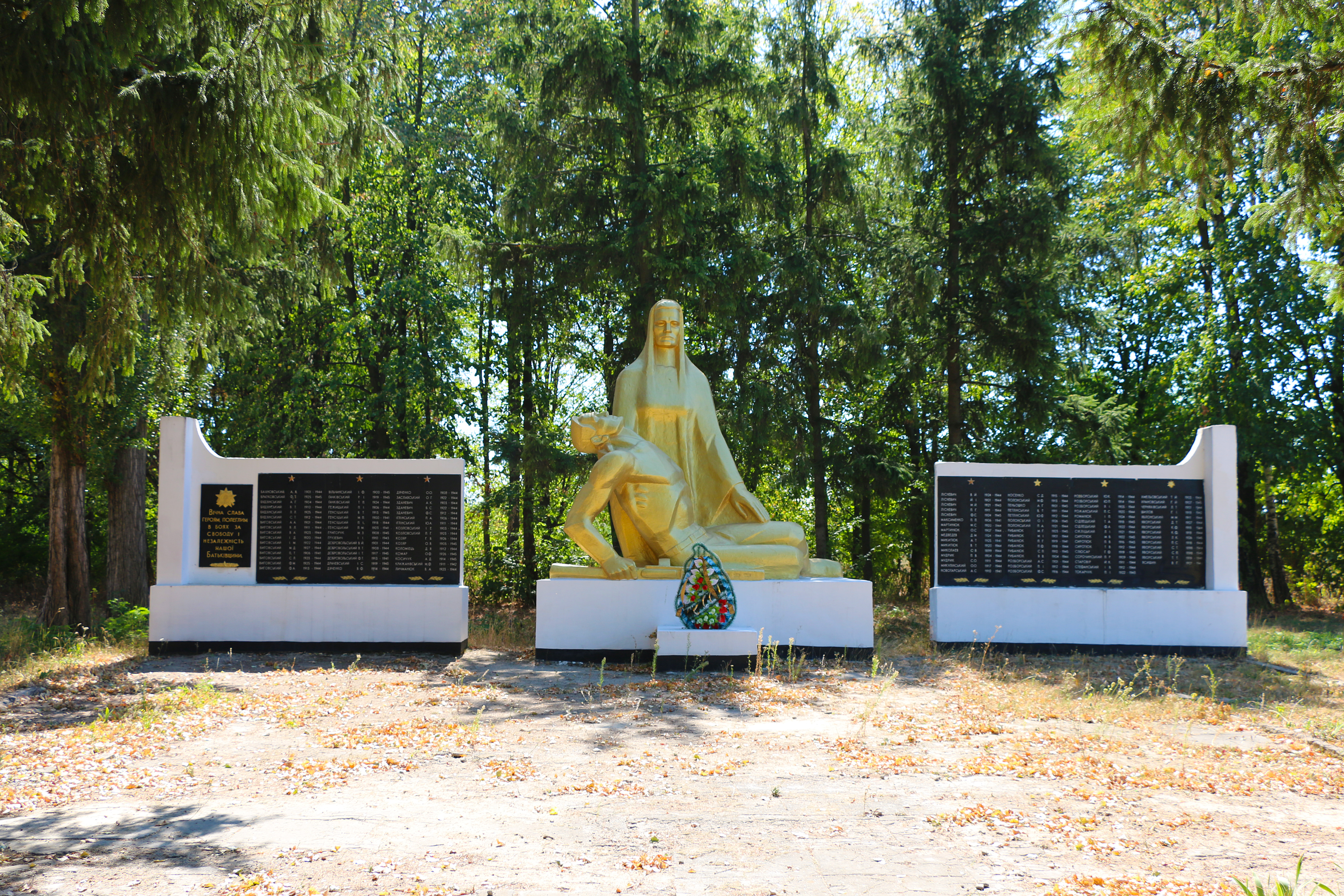 Пам’ятник 112 воїнам – односельчанам, загиблим на фронтах ВВВ, Майдан, біля клубу